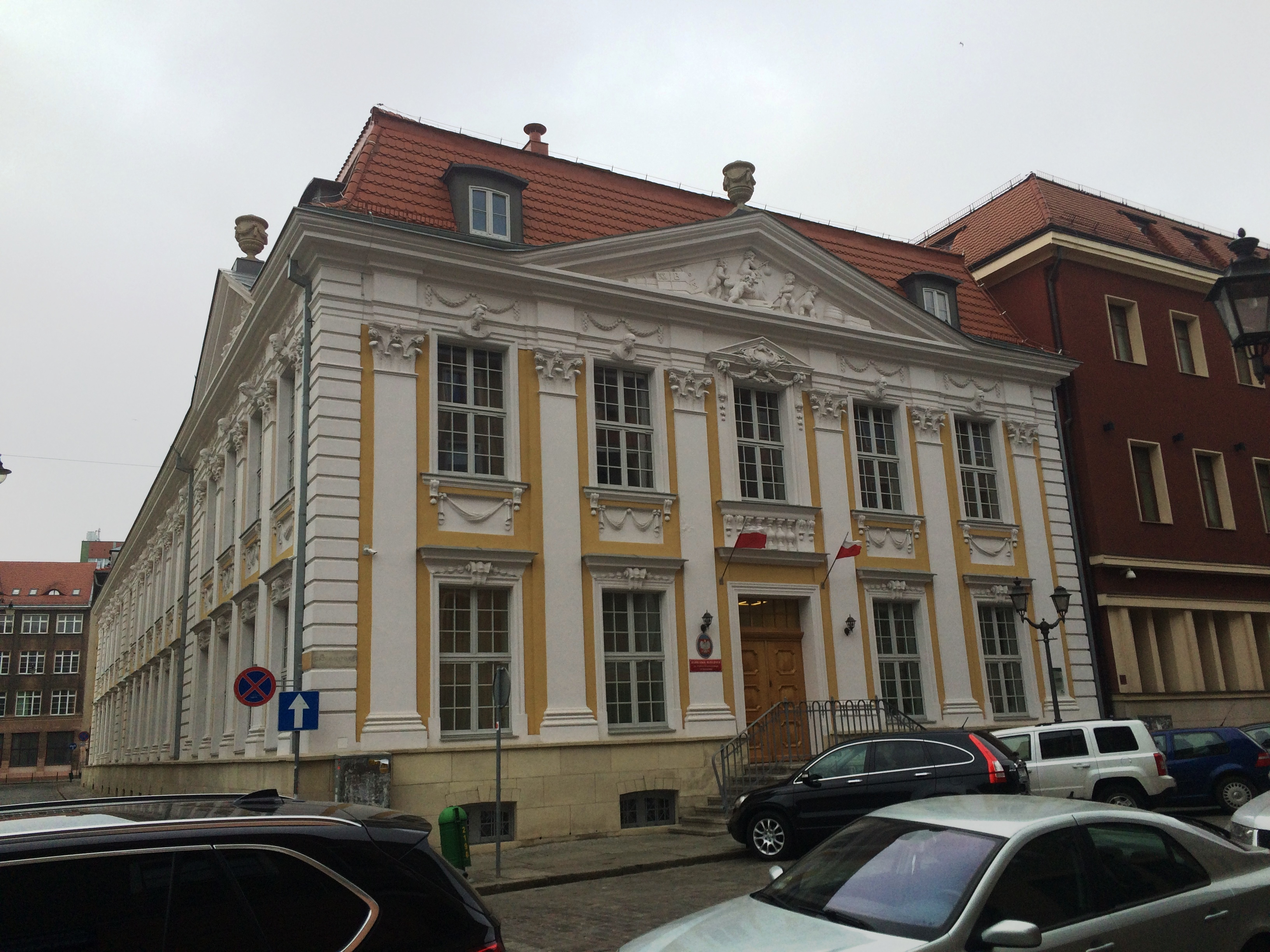 Pałac Velthusena (1778-1779), siedziba Zespółu Szkół Muzycznych im. Feliksa Nowowiejskiego w Szczecinie